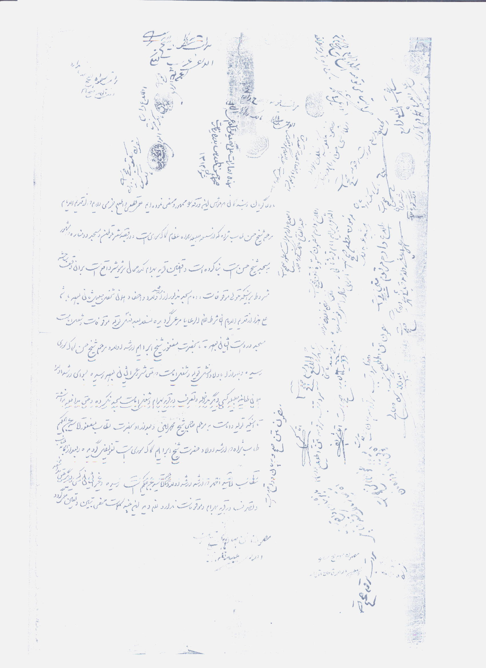 سند وقف روستای بهرام